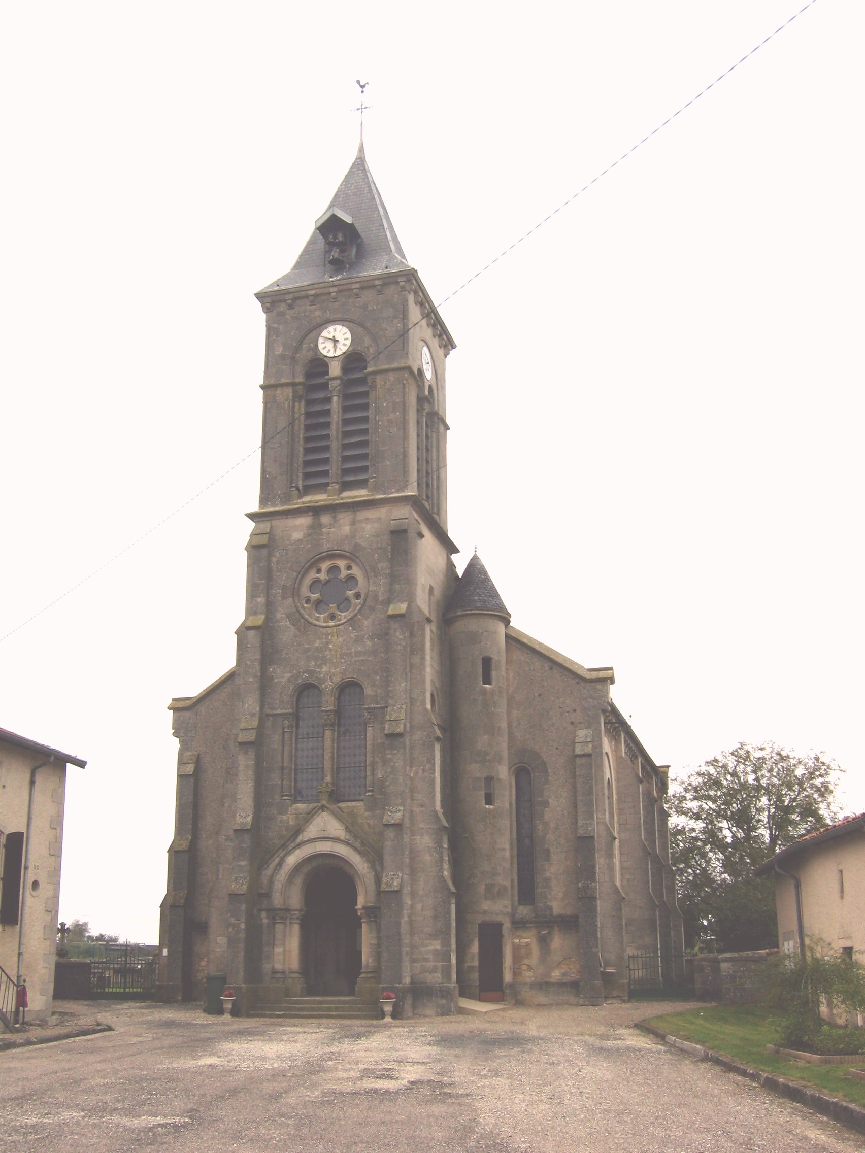 Église de Raulecourt-55-Eglise